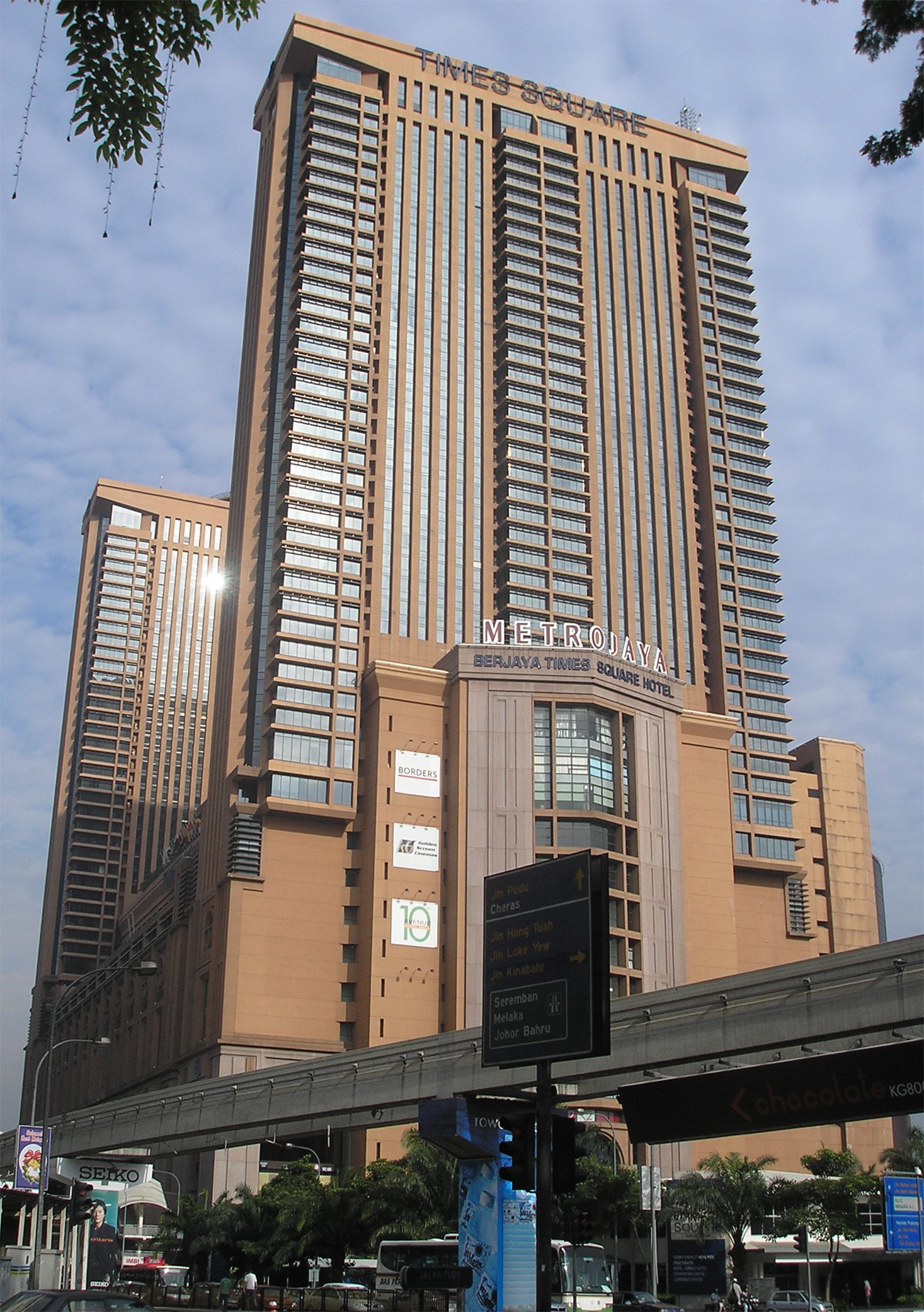 Berjaya Time Square in the afternoon, Kuala Lumpur, Malaysia.